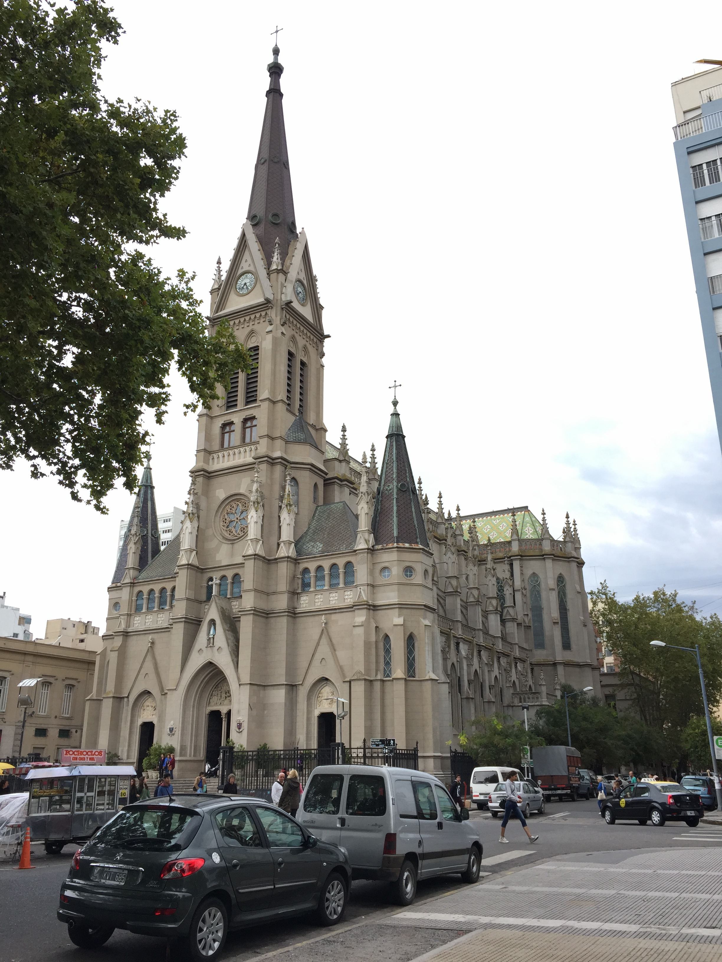 Catedral de los Santos Pedro y Cecilia en Mar del Plata, Argentina.